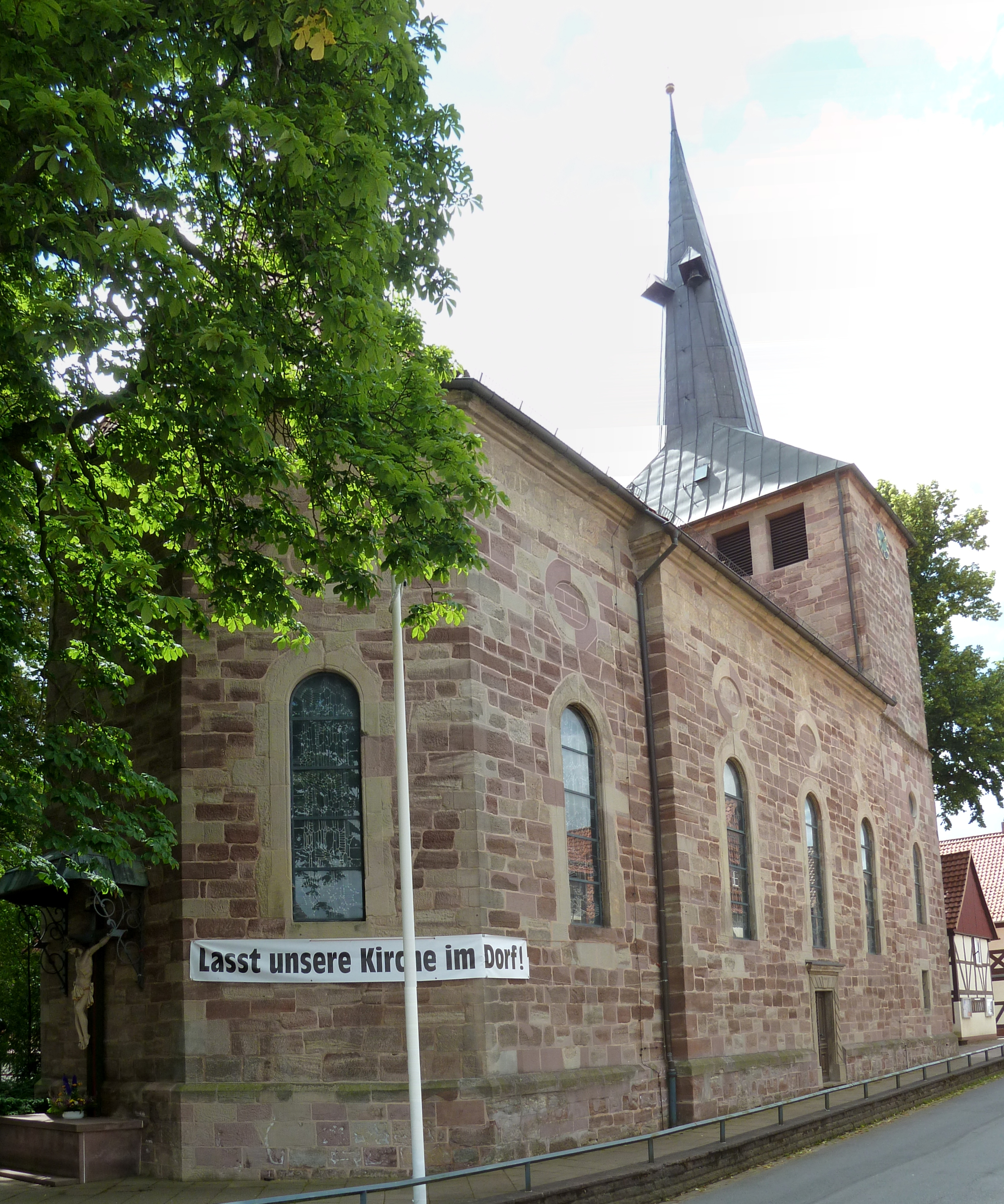 Kath. Kirche St. Alexander und Brüder in Krebeck, Untereichsfeld. Erbaut 1716, Turm im Kern spätmittelalterlich, Turmhelm 19. Jahrhundert